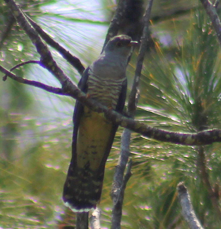 Madagaskarkoekoek